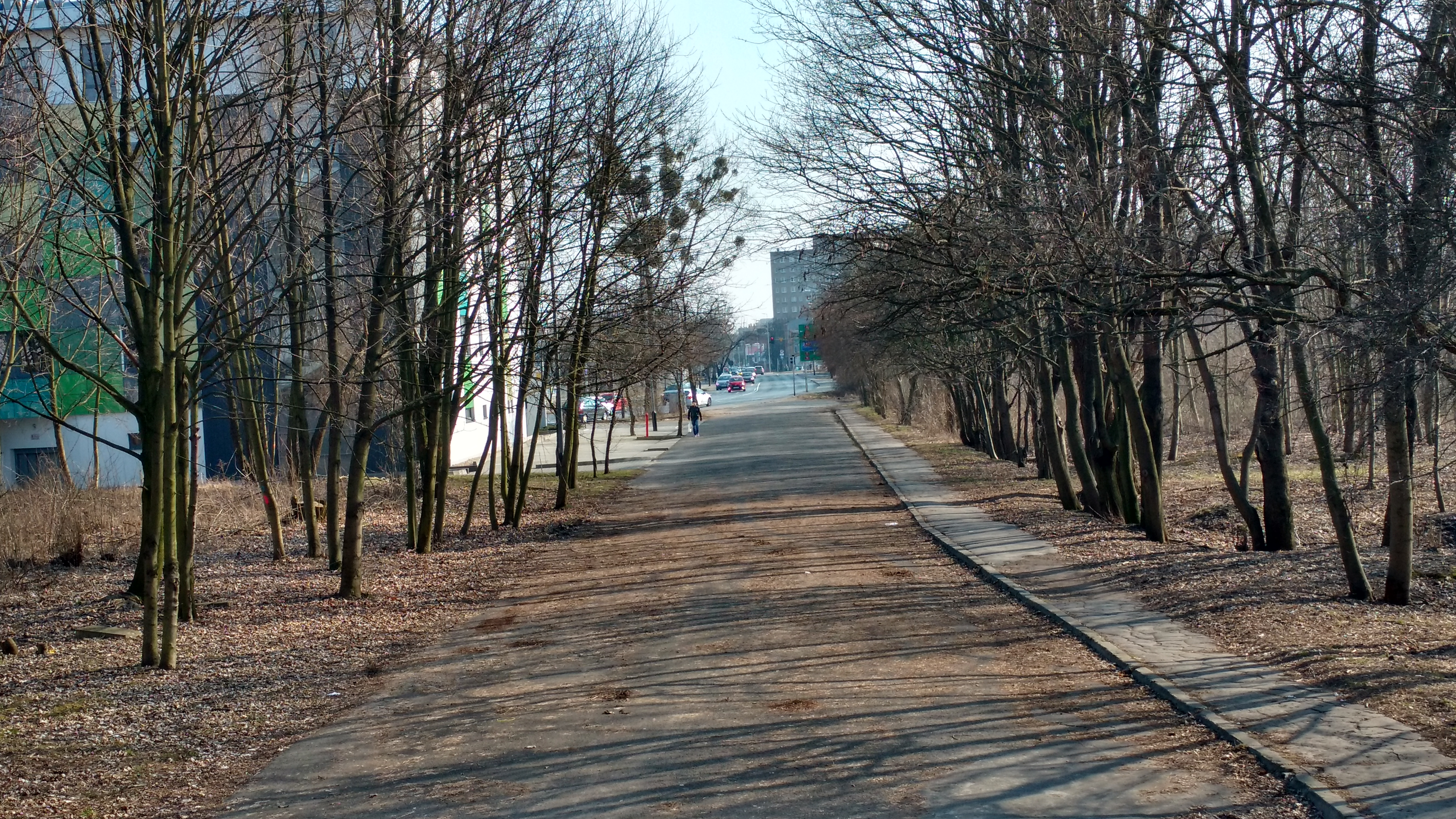 Nieużywany fragment dawnej ul. Obornickiej, widoczny z ul. Juraszów